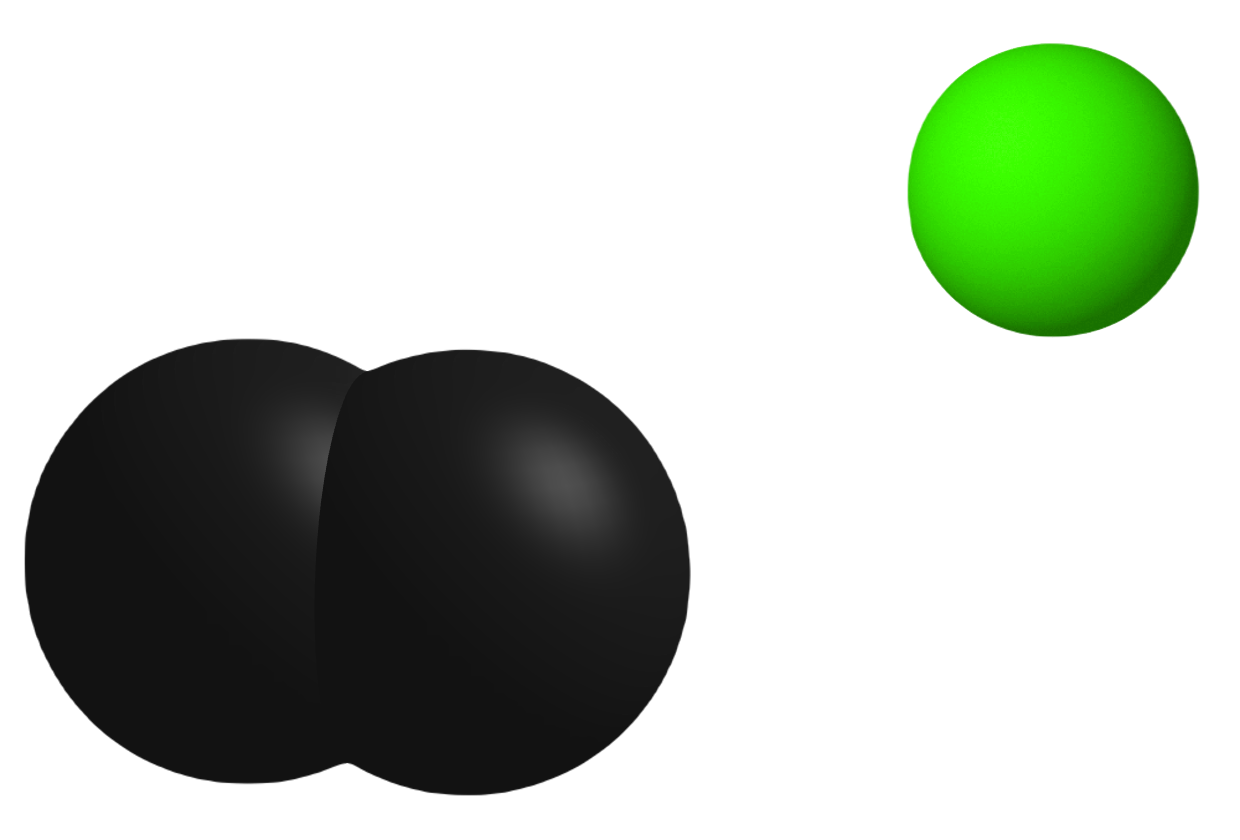 Calcium Carbide 3D Molecule, CaC2